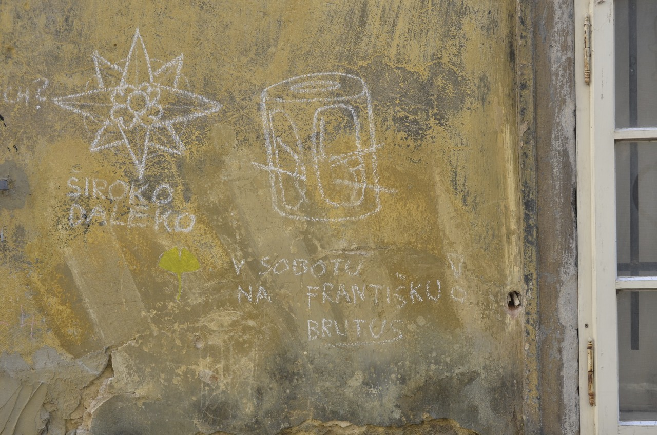 Ohlasy Foglarových knih o Stínadlech na pražských zdech.